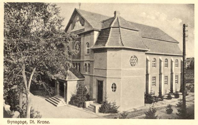 Ansichtskarte mit der Synagoge (bestand 1921-1938) in Deutsch Krone (nach 1945 umbenannt in Walcz)